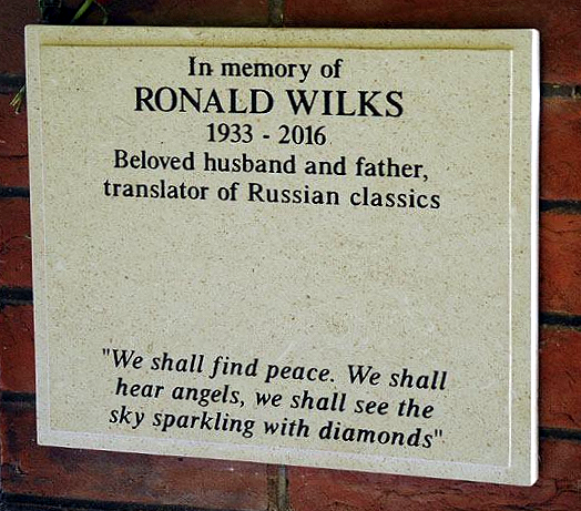 В лондонском крематории Голдерс-Грин на стене восточного крыла аркады размещена мемориальная табличка Рональда Уилкса с отрывком из чеховской пьесы «Дядя Ваня»: "We shall find peace. We shall hear angels, we shall see the sky sparkling with diamonds" («Мы отдохнем! Мы услышим ангелов, мы увидим все небо в алмазах»).